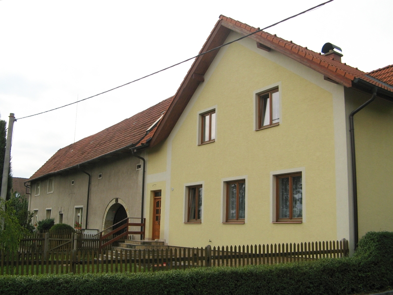 Usedlost čp. 55, Jehnědí 55, Jehnědí.